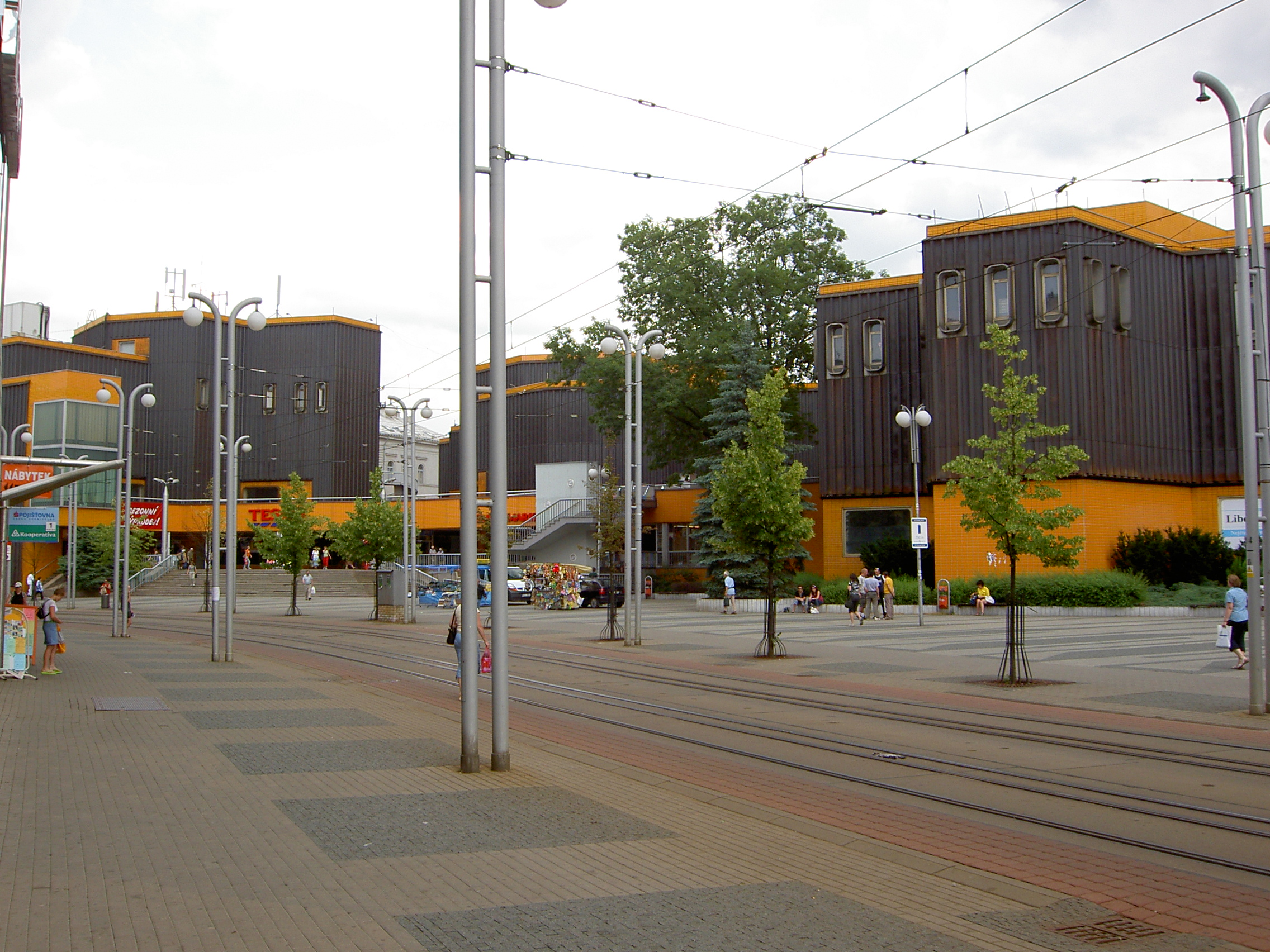 Obchodní dům Ještěd v Liberci